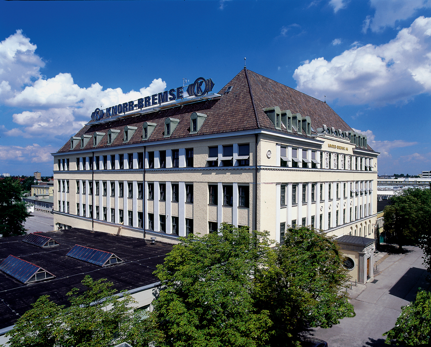 heutige Hauptverwaltung der Knorr-Bremse AG in München, Moosacher Straße 80erbaut 1916/1918 als Verwaltungsgebäude zum Fabrikneubau der Rapp Motorenwerke GmbH